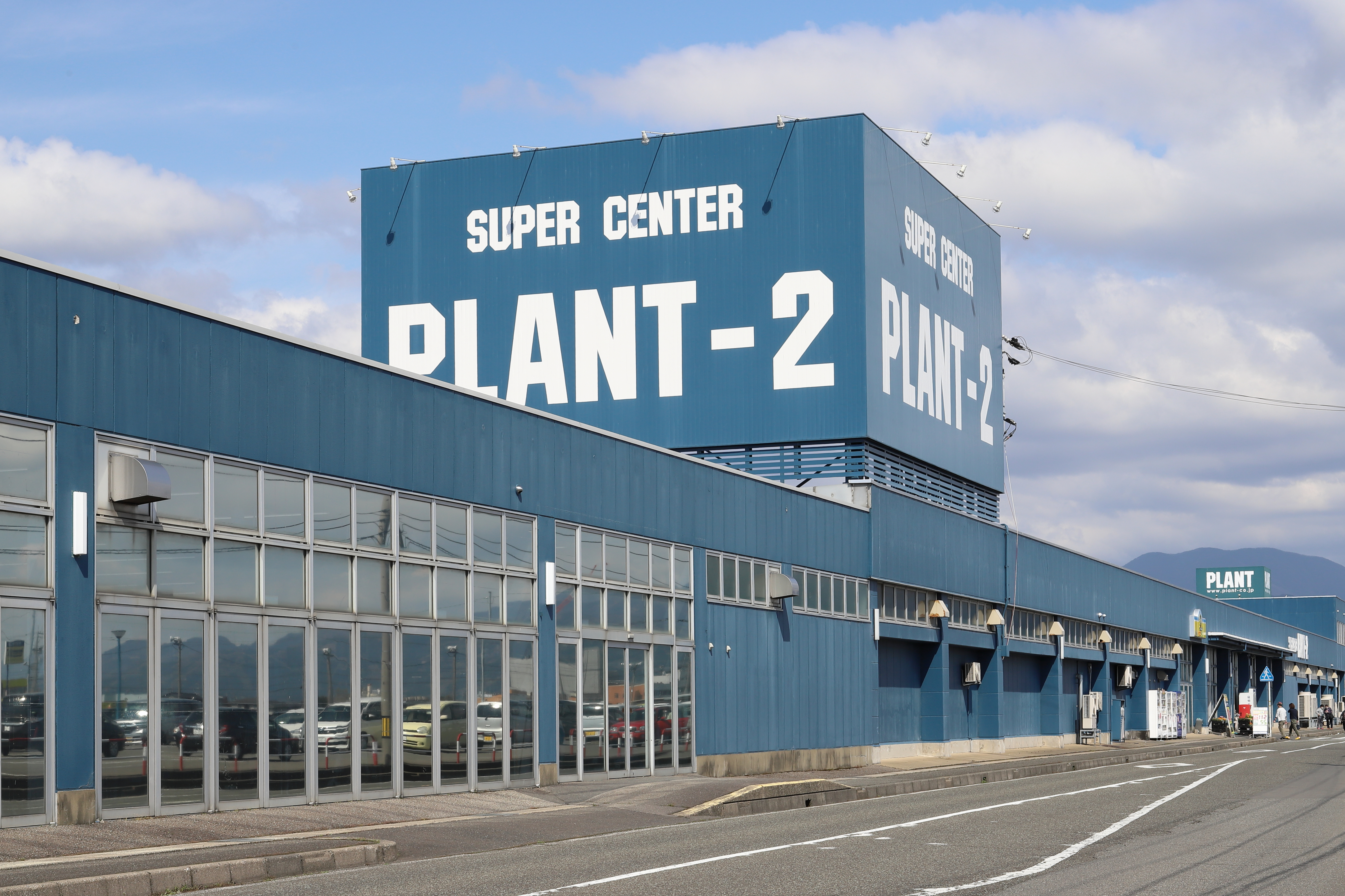 PLANT-2 坂井本店 Canon EOS 6D Mark II